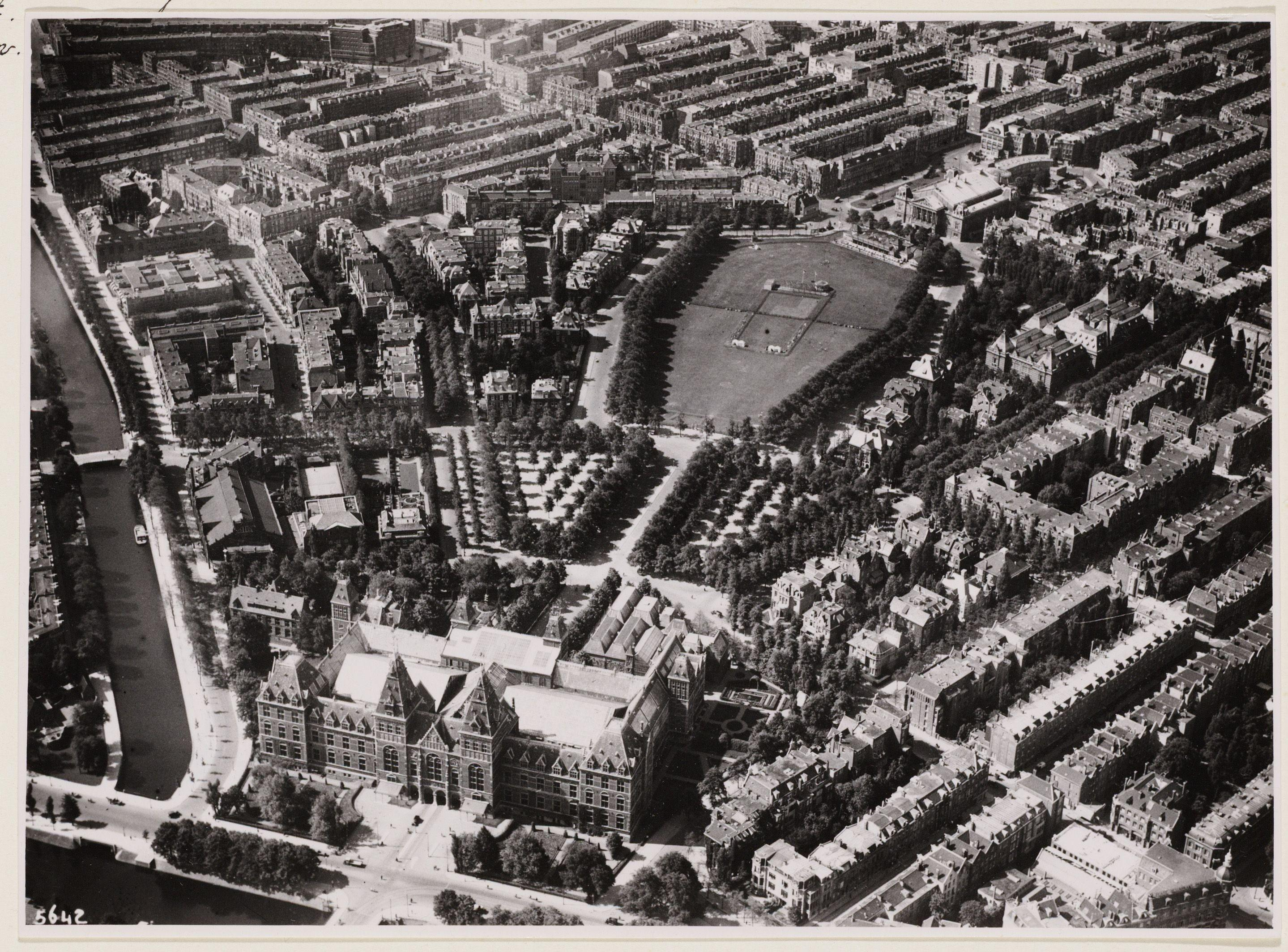 Luchtfoto van het Museumplein en omgeving gezien in zuidwestelijke richting Links de Boerenwetering. Bovenaan het Concertgebouw, Van Baerlestraat 98. Rechts onder de Paulus Potterstraat. Onderaan het Rijksmuseum, Stadhouderskade 42.